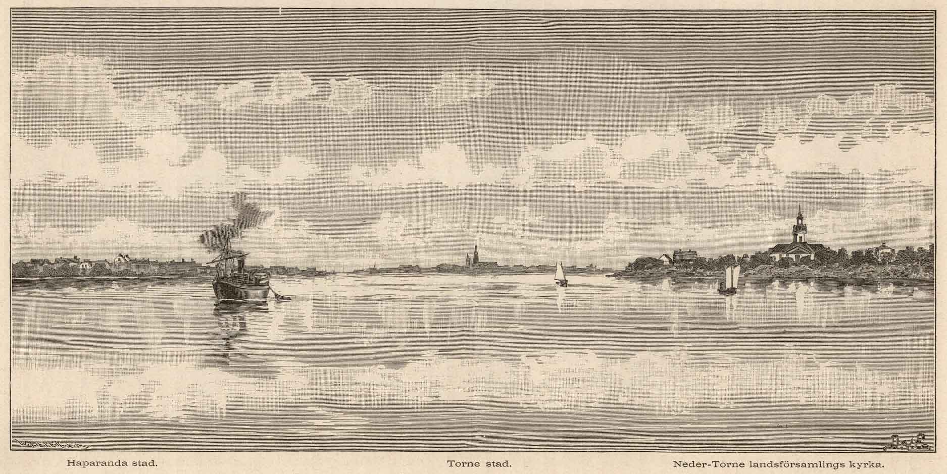 Torne älvs mynning. Haparanda stad. Neder-Torne landsförsamlings kyrka